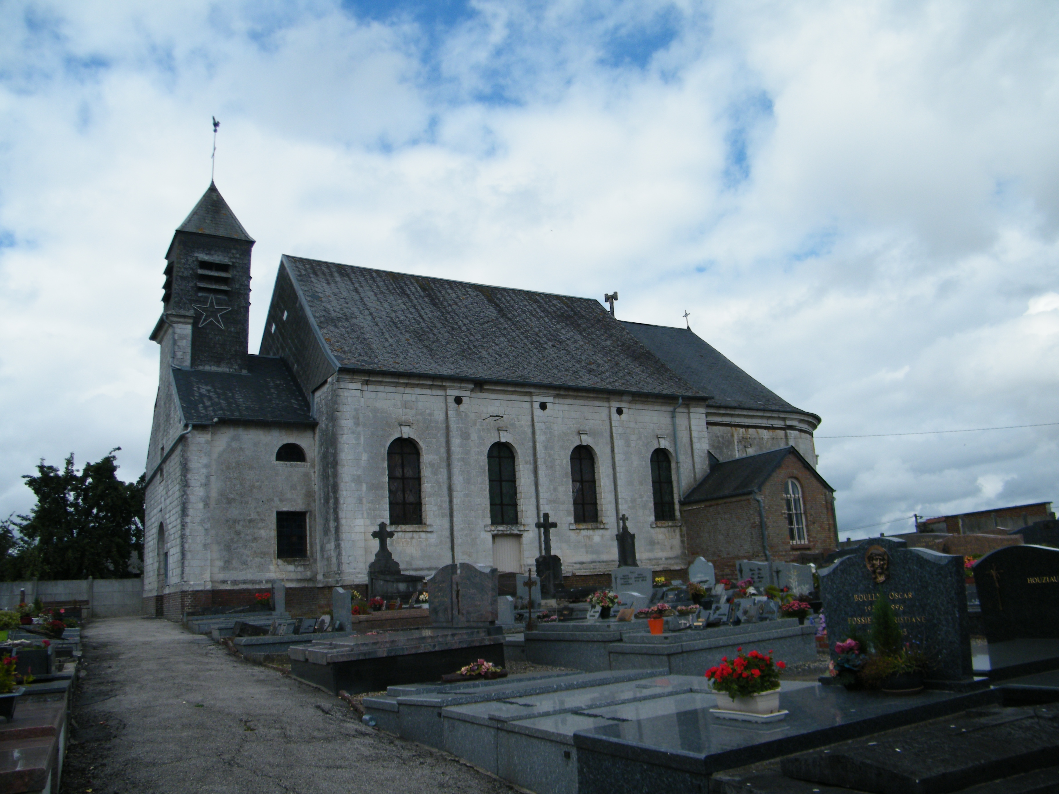 Vue de l'église.